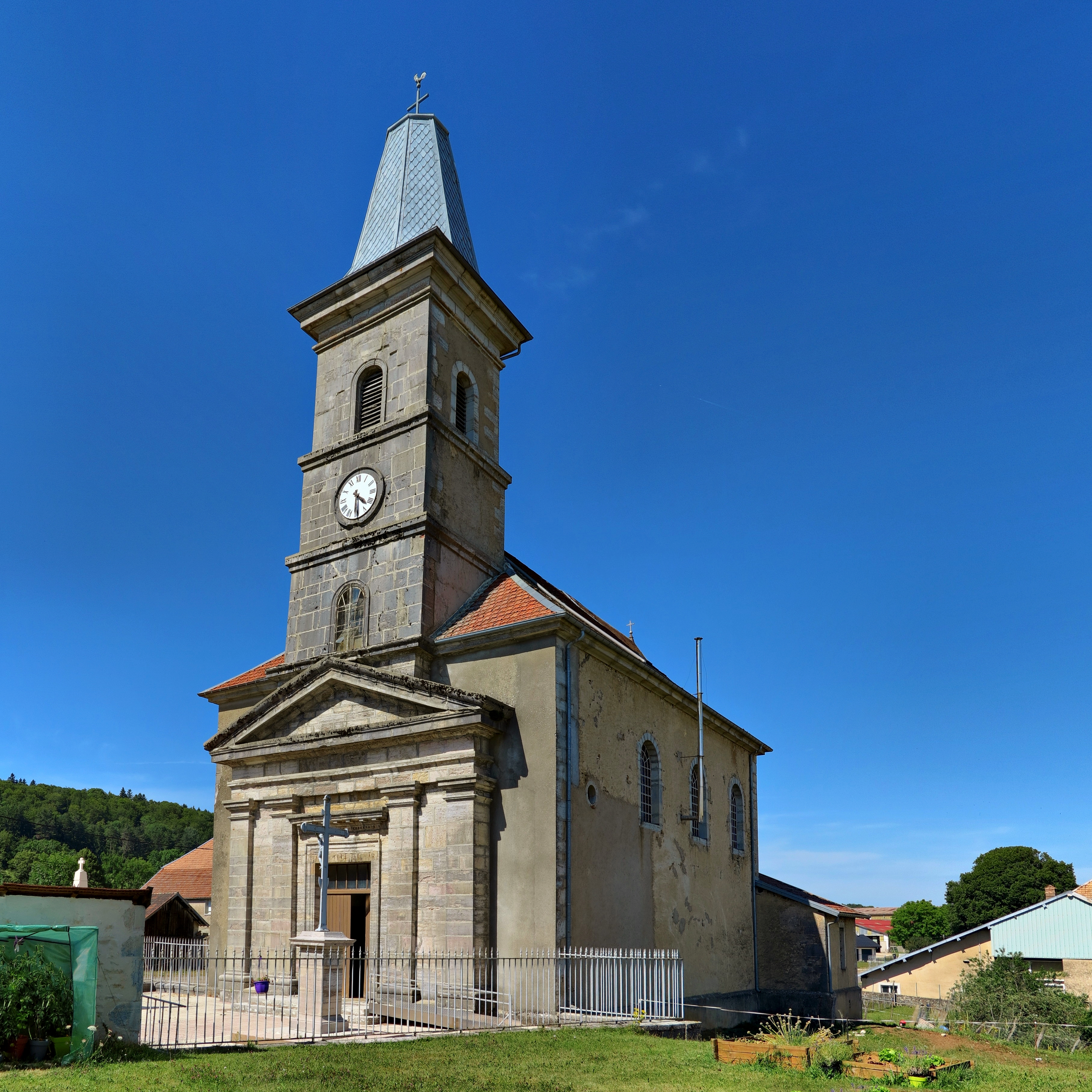 L'église